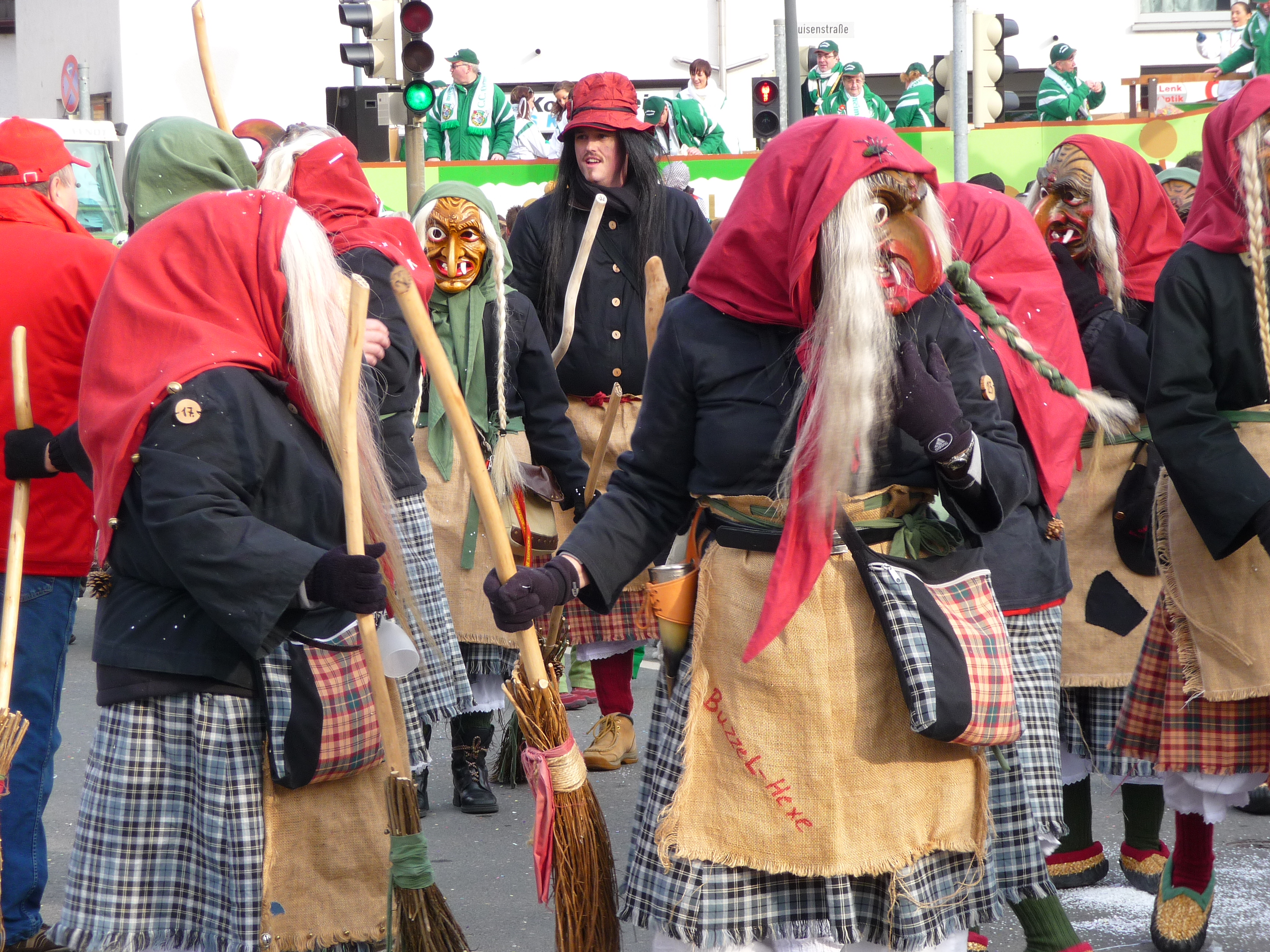 Buzzel-Hexenzunft Oftersheim beim Backenbläser-Faschingsumzug am 15.02.2009 in Plankstadt (Rhein-Neckar-Kreis)